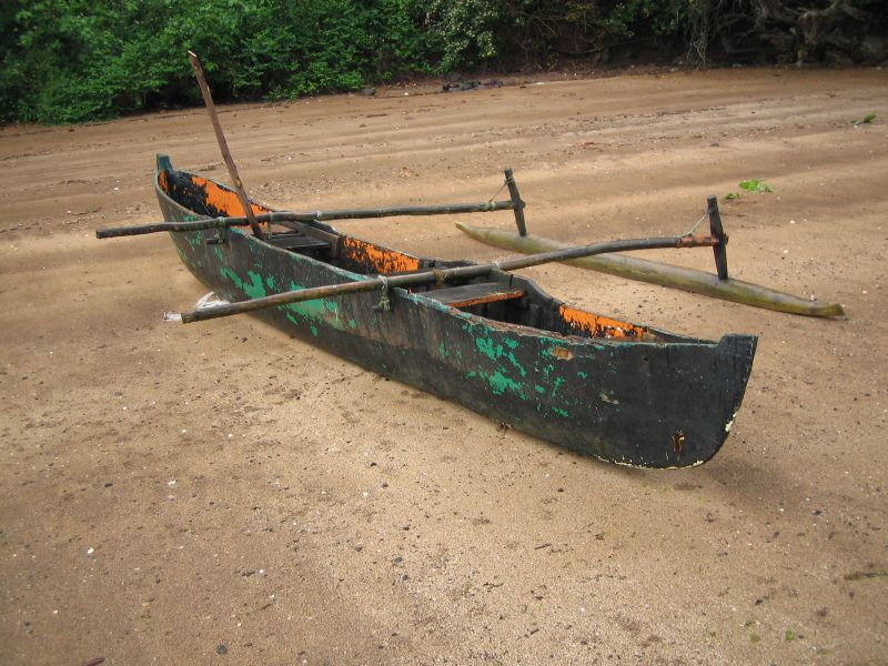 Pirogue sur la plage de Sohoa, près de Chiconi, à Mayotte